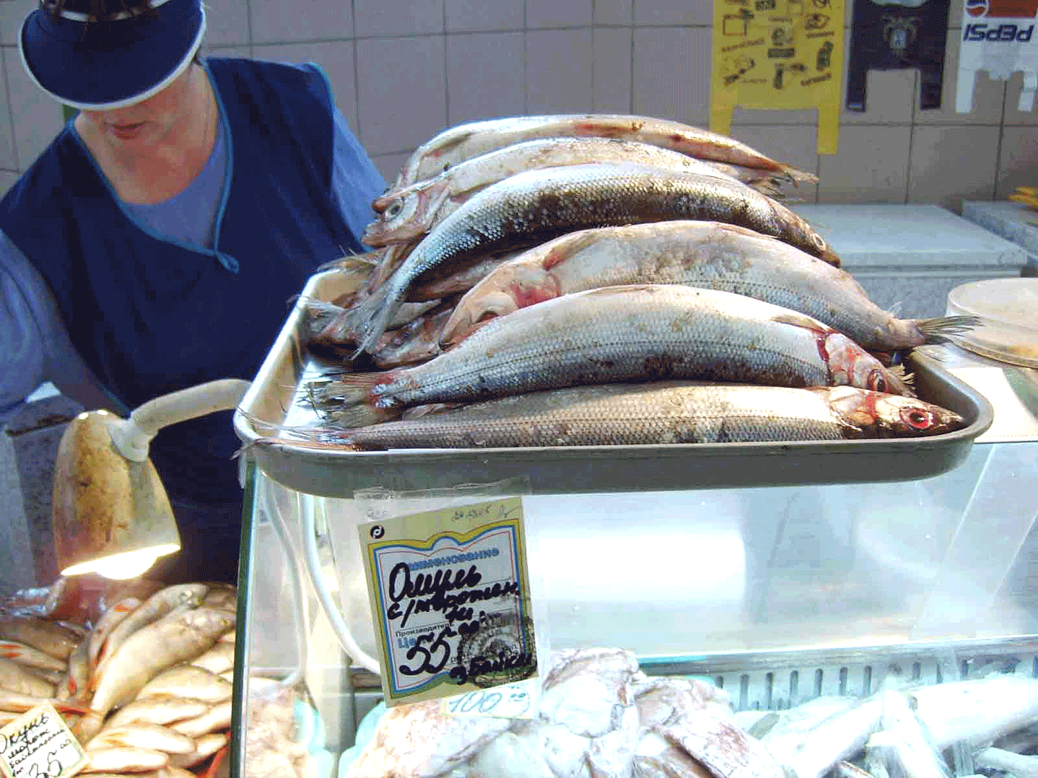 Frischer Omul im Angebot der Markthalle von Irkutsk.